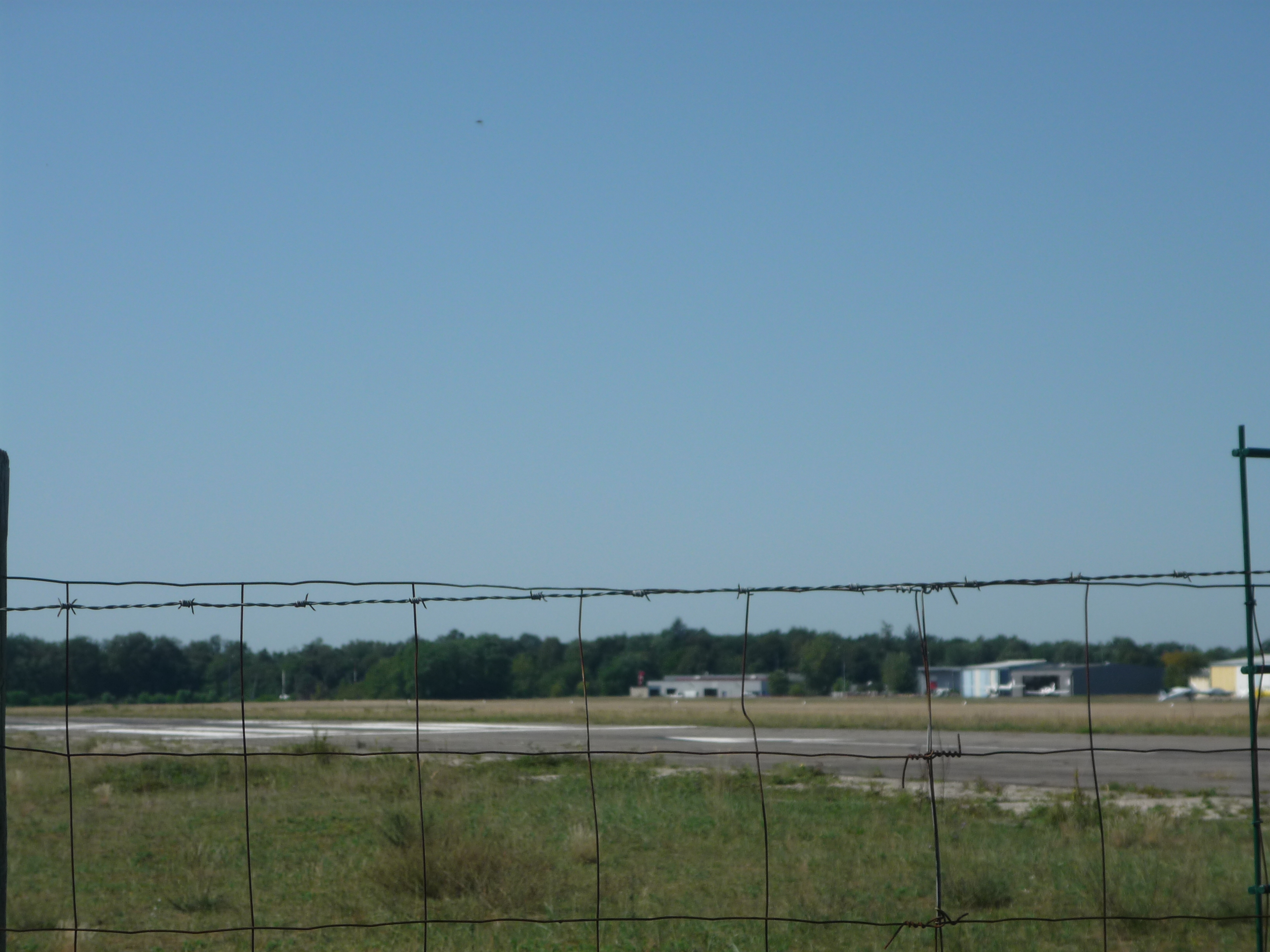 pistes en herbe, en bitume et hangars de l'aérodrome de Haguenau